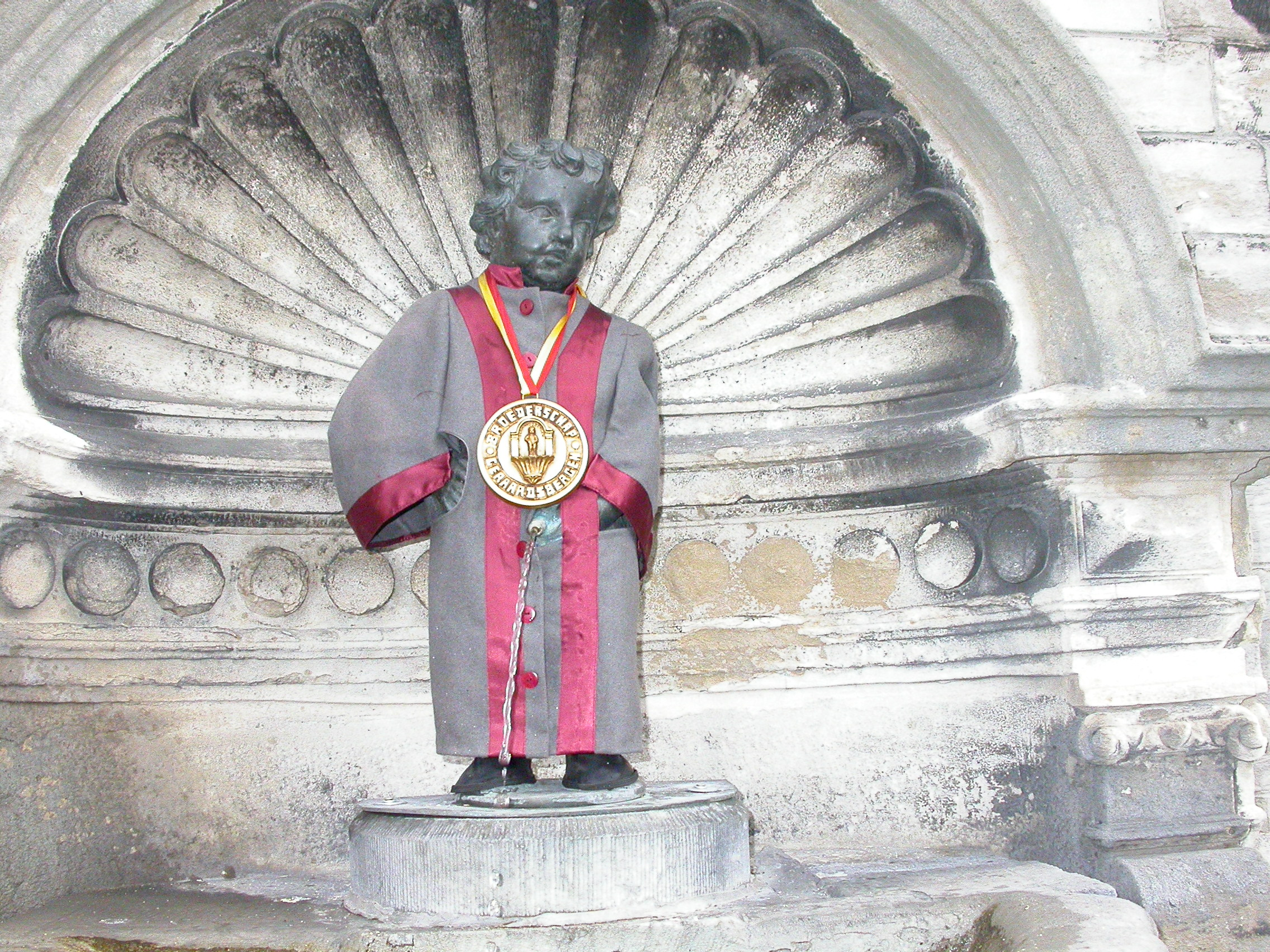 Geraardsbergs Manneken Pis in Broederschap van het Geraardsbergs Manneken Pis kostuum